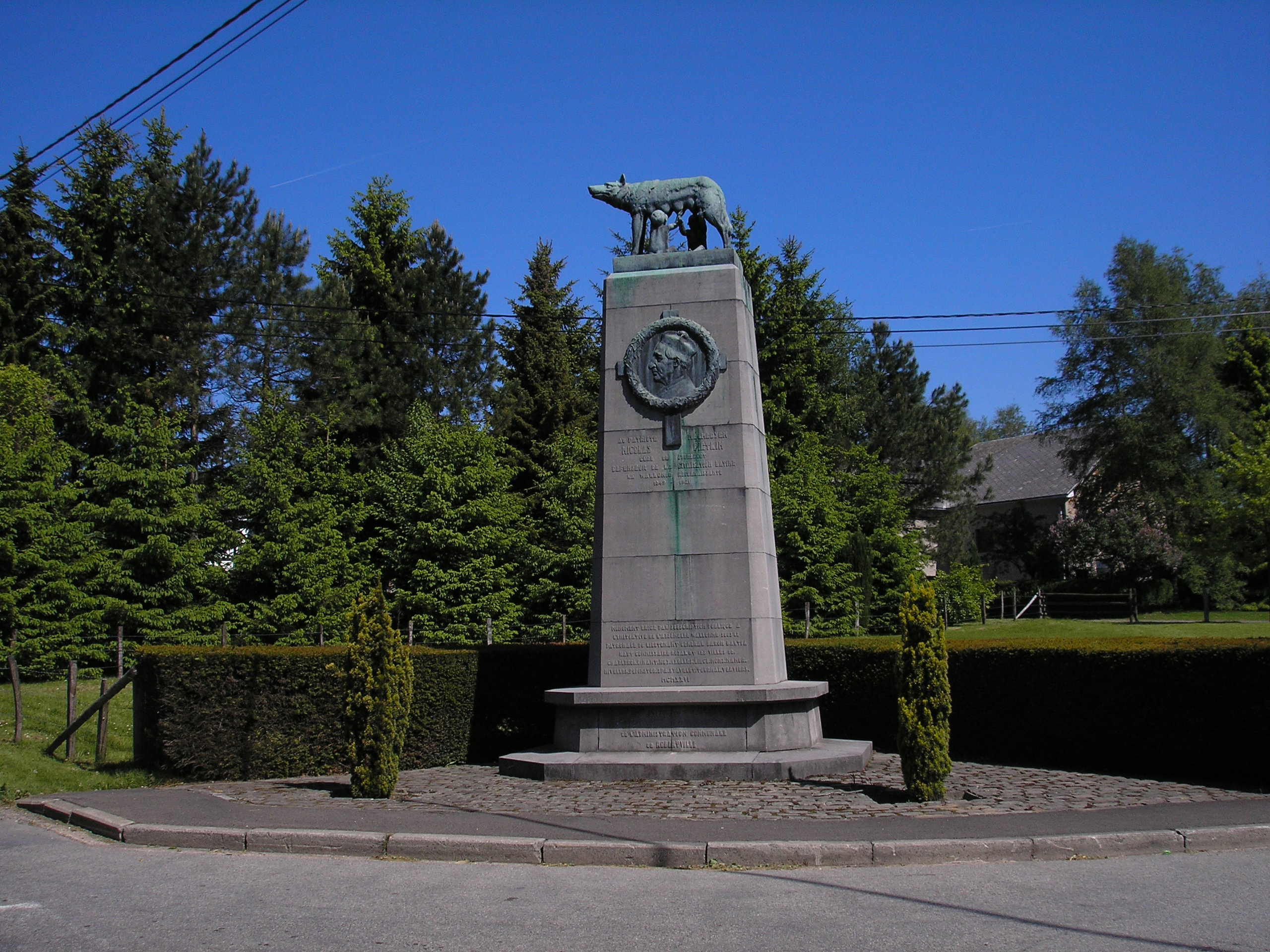 Pietkin-Denkmal, Sourbrodt, East Belgium